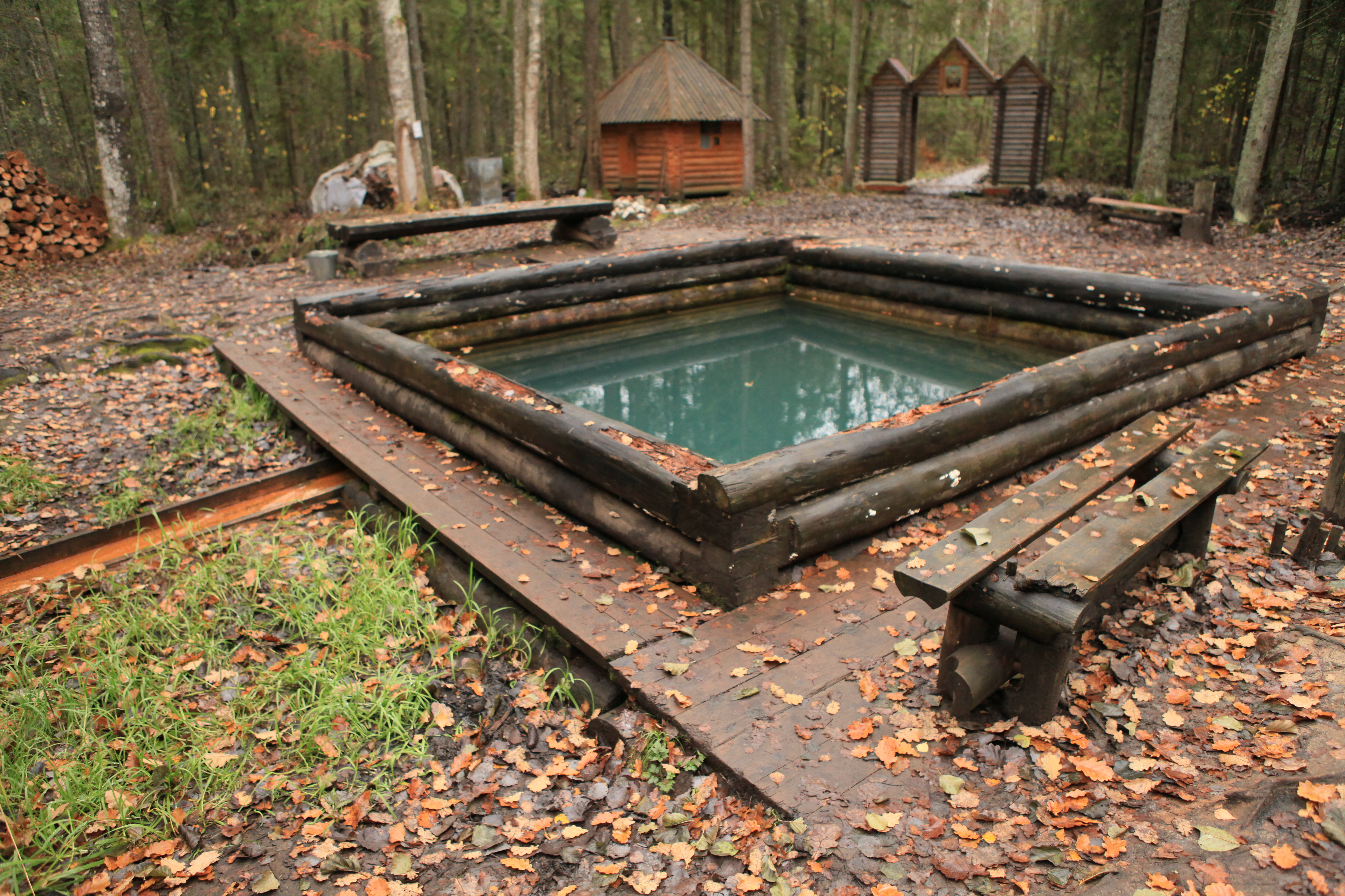 На запад в двух с небольшим километрах от монастыря расположен радоновый источник прп. Александра Свирского. Вода в нем голубого цвета, причем, и зимой, и летом имеет температуру + 6 градусов.